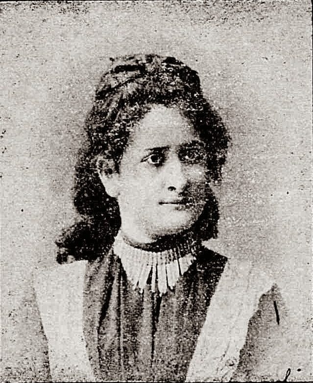 Φωτογραφία της Ιωάννας Στεφανόπολι